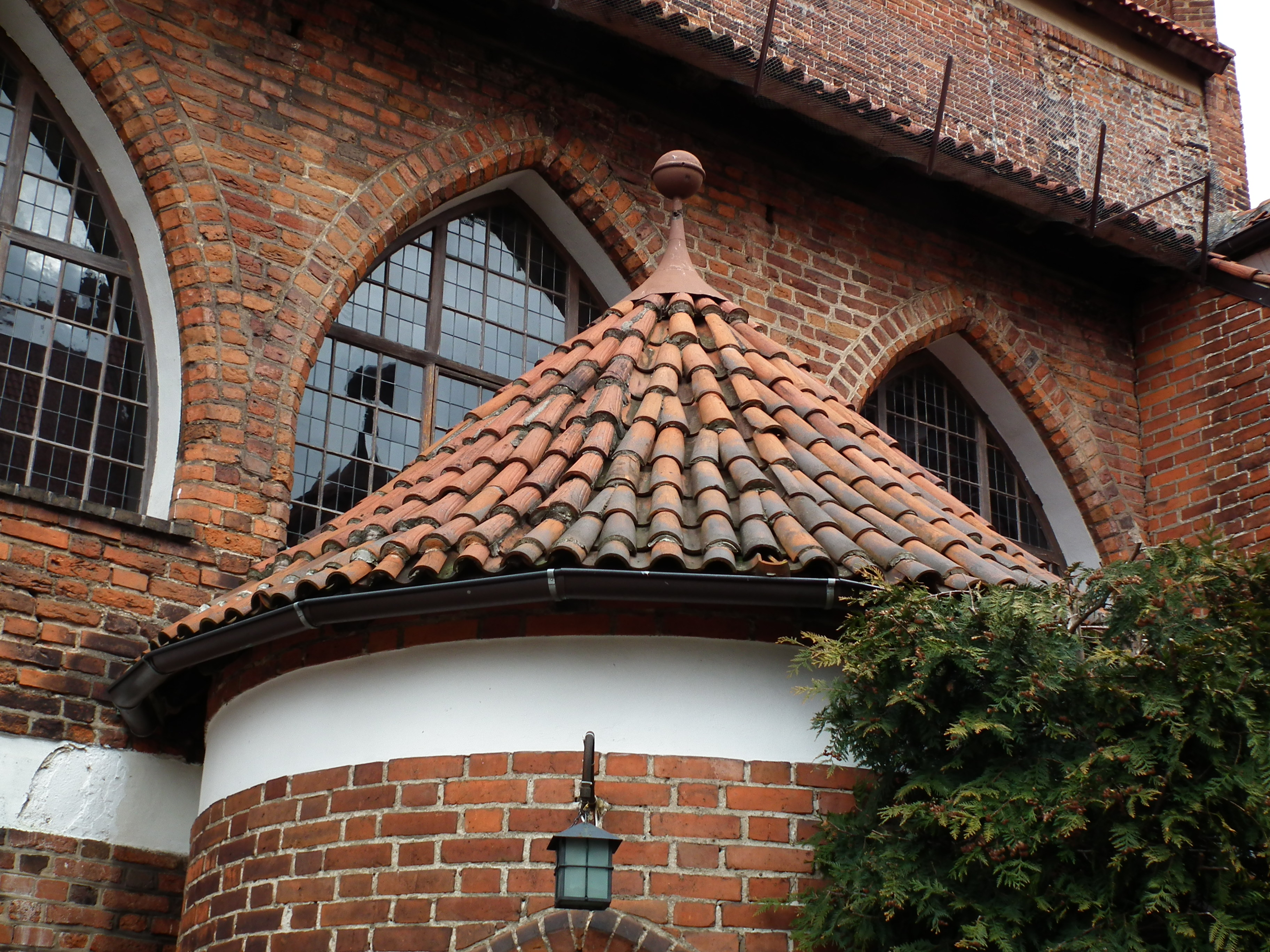 Zamek w Olsztynie.